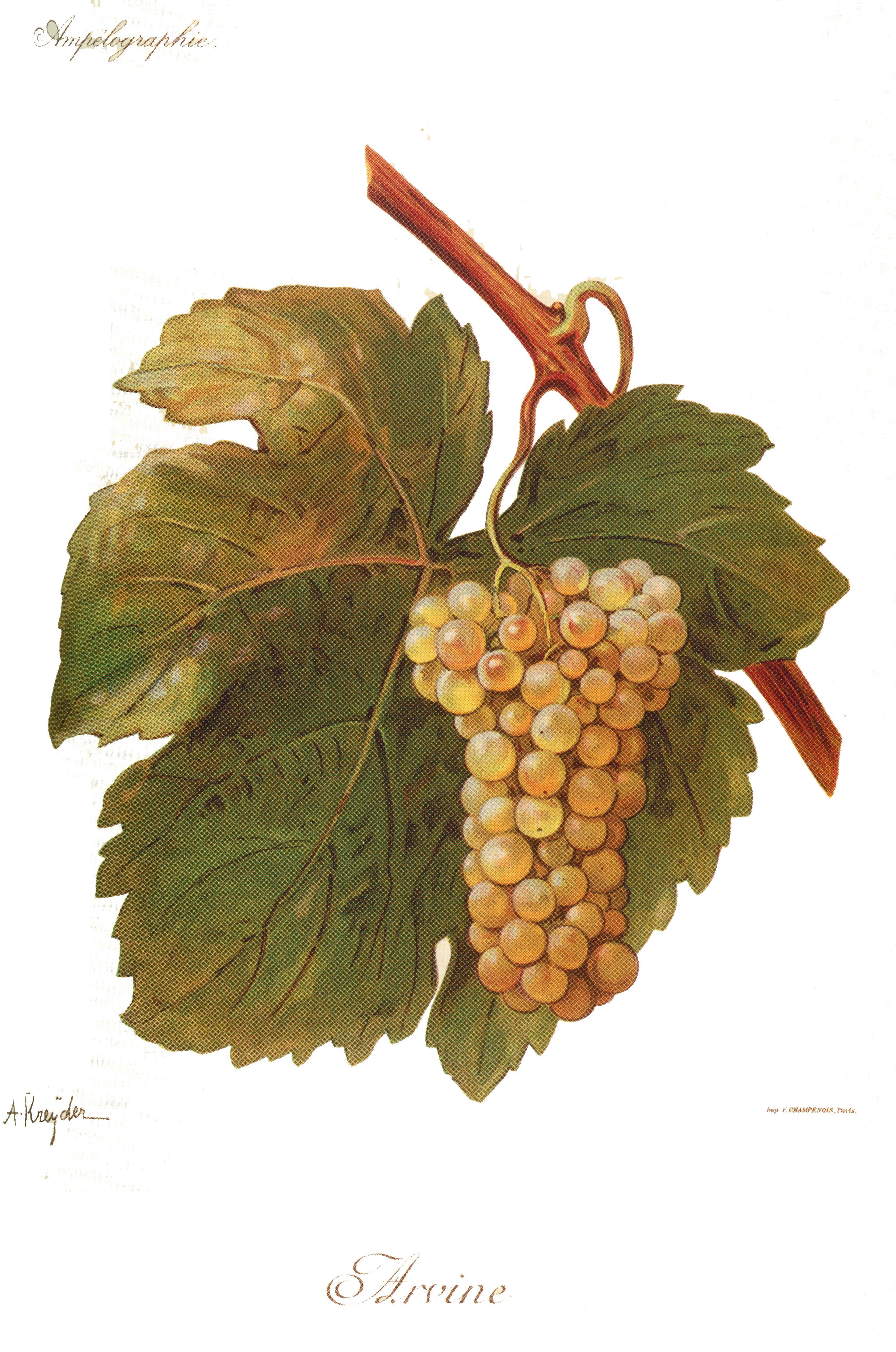 Arvine w L'Ampélographie Viali i Vermorela (1901-1910)